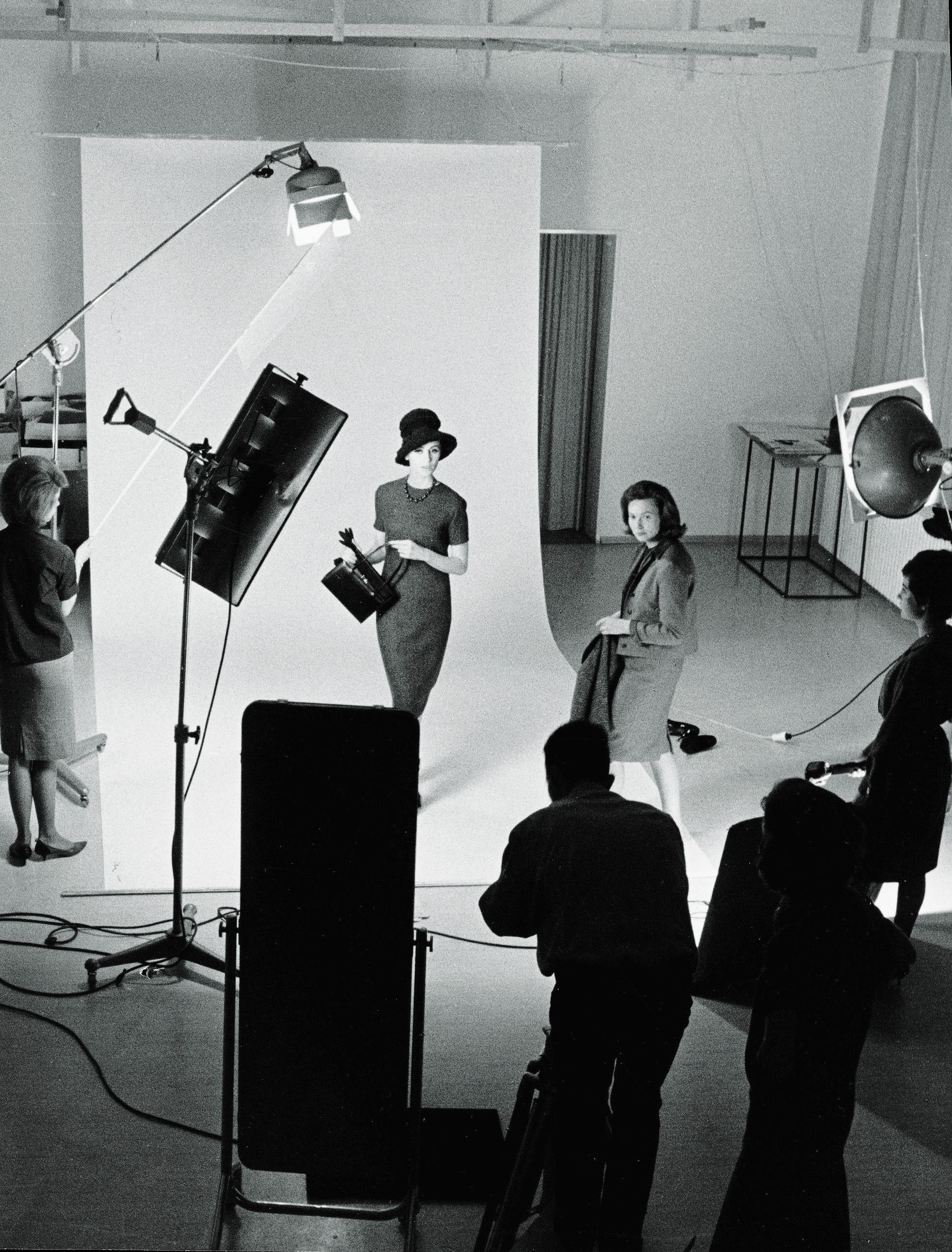 Burda Moden Fotostudio.